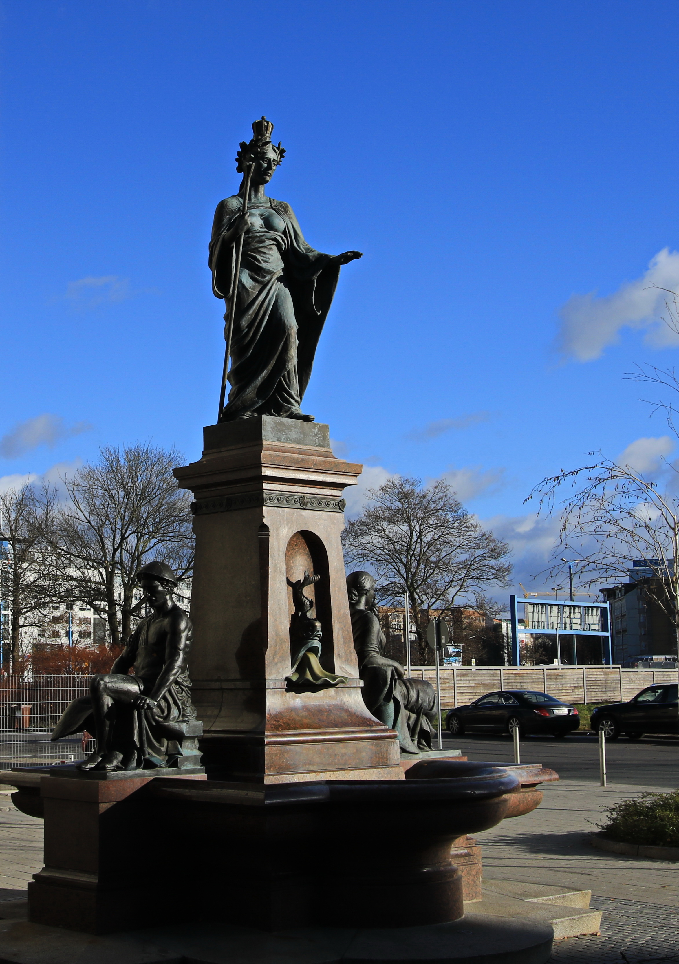 Saxoniabrunnen in Chemnitz in Sachsen.